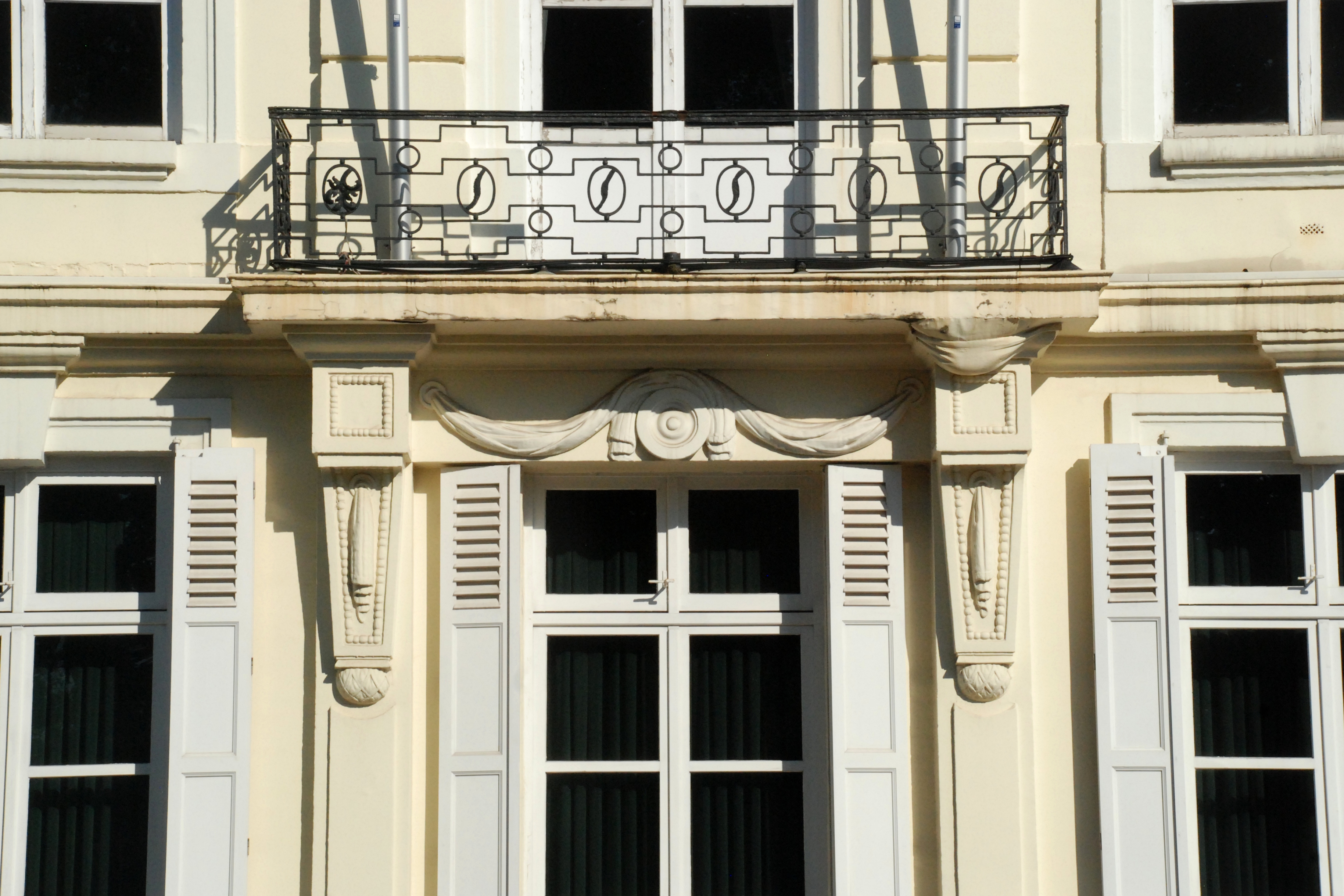 Belgique - Bruxelles - Résidence du Premier ministre de Belgique